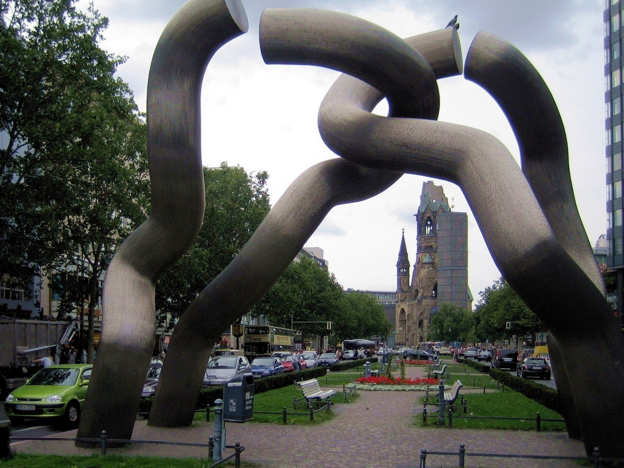 Berlin, Tauentzienstraße mit Skulptur "Berlin" von 1987. Im Hintergrund die Kaiser-Wilhelm-Gedächtniskirche.